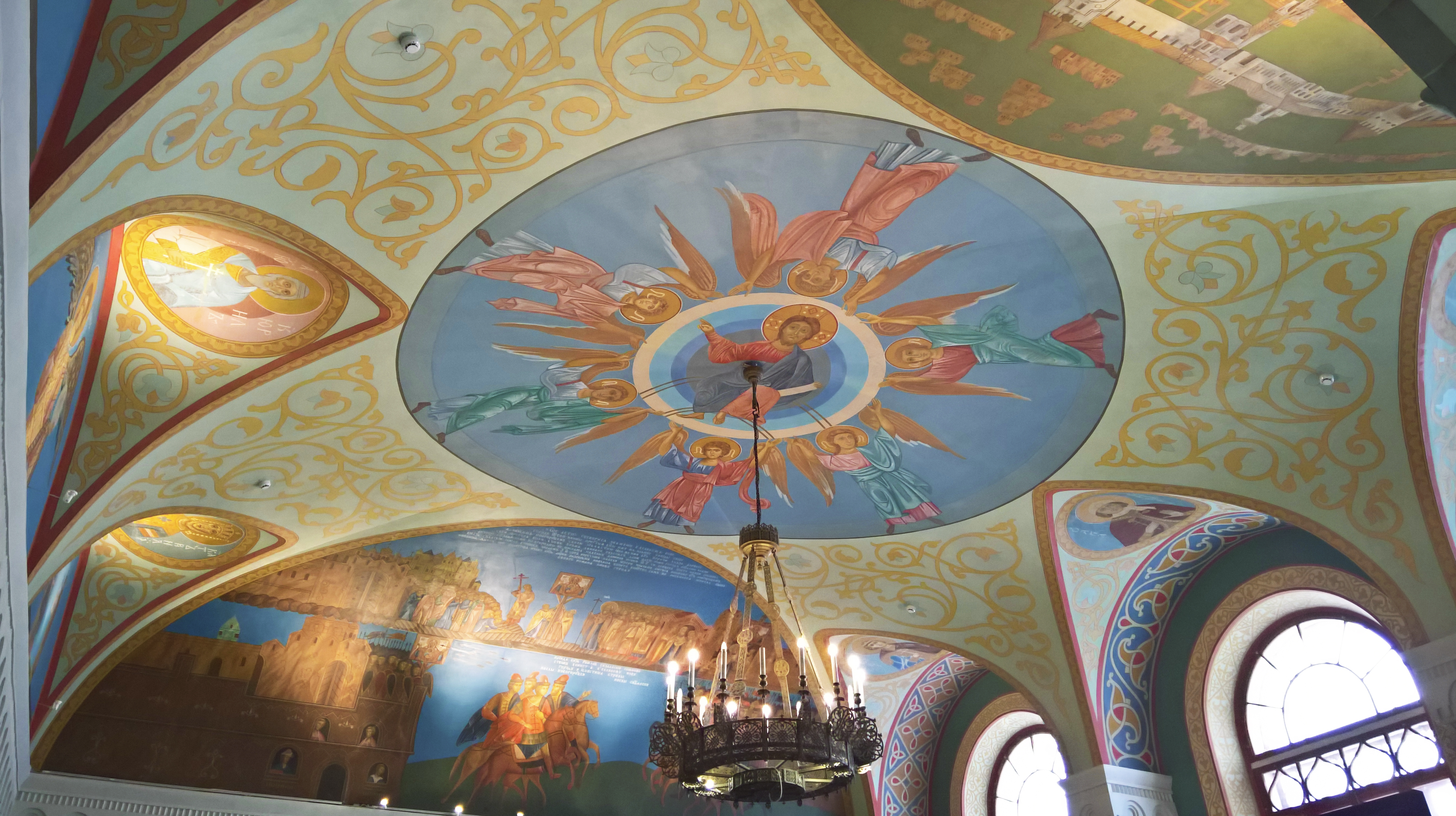 “Новгородский” - один из самых богато декорированных залов первого этажа Государственного Исторического музея. По проекту А. П. Попова и Н. В. Никитина оформляли зал палехские мастера артели Н. М. Сафронова. Стены и потолок расписаны копиями фресок из церкви Спаса на Нередице, особенно ценными после разрушения оригинала в 1942 году.